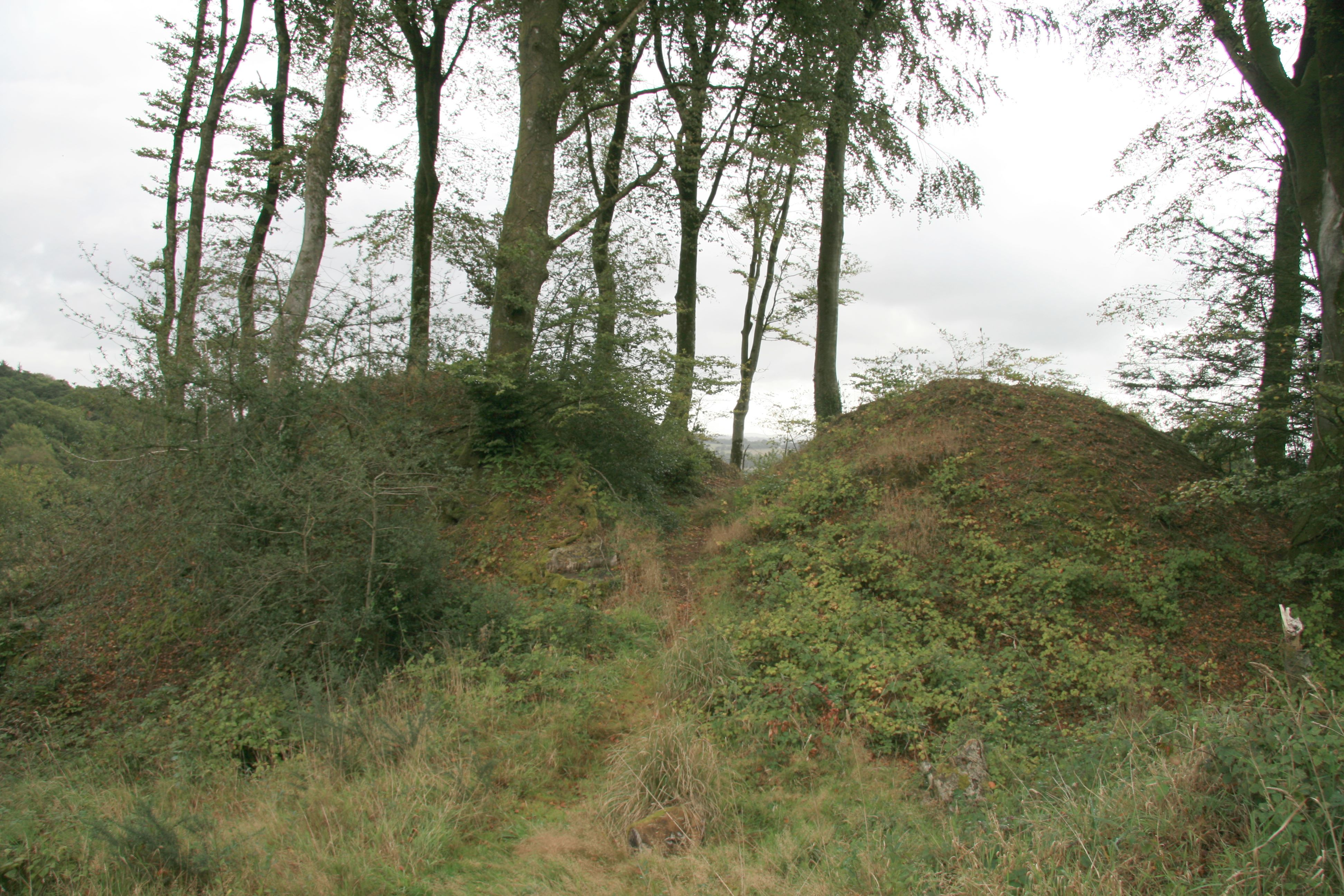 Motte Féodale du Zilou - 22480 Saint Nicolas du Pélem - France